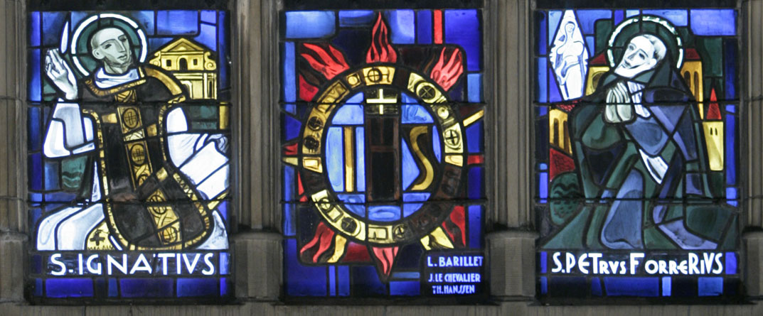 Ënneschten Deel aus der Chouerfënster "gloriae mysteria" vun der Kathedral Notre-Dame vu Lëtzebuerg mam Monogramm IHS, dem Hl Ignatius an dem Abbé Pierre Fourier